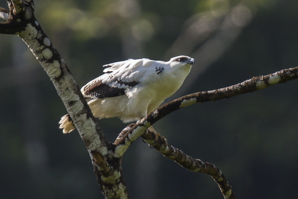 White Hawk - Panama_H8O7606